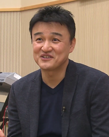 라디오 DJ 데뷔 후 인터뷰를 하는 박중훈.